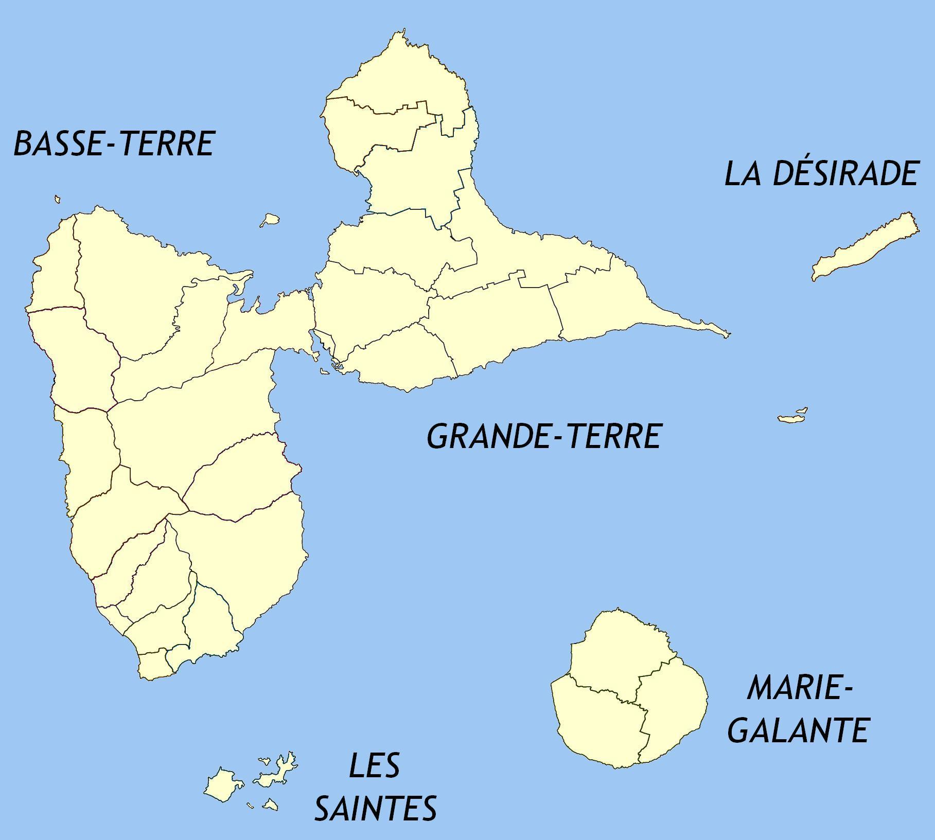 Carte modifiée d'après une image svg prise sur commons et intitulée "Baie-Mahault".